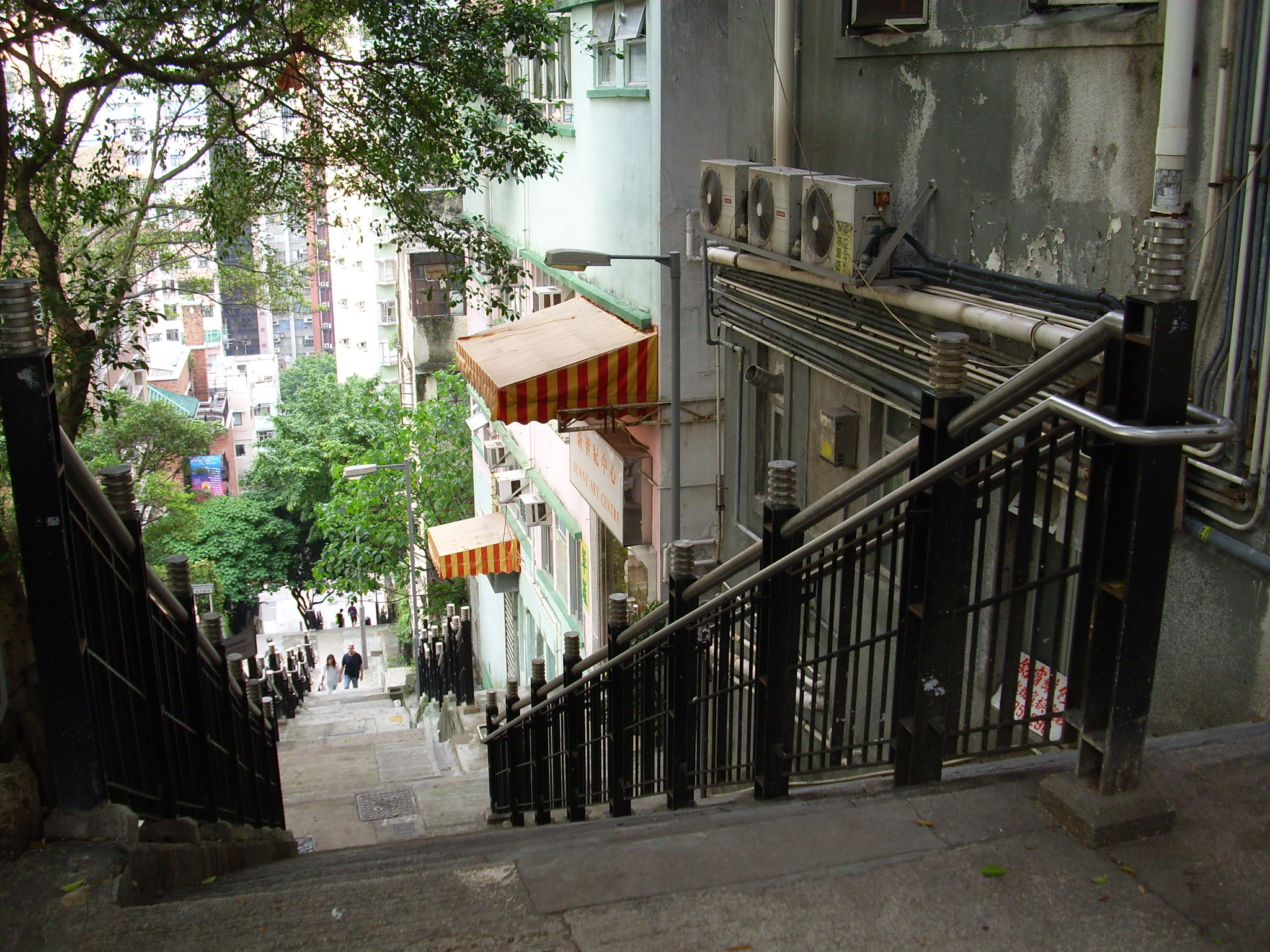 ladder street of HK